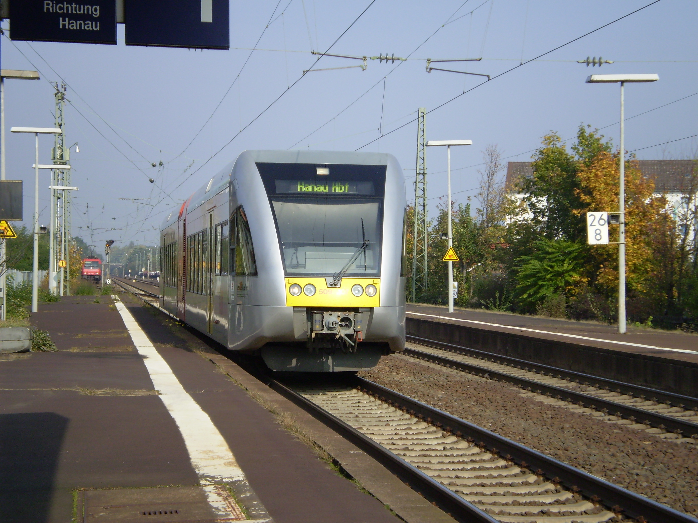 GTW der Hessischen Landesbahn am Bahnhof Hanau Nord